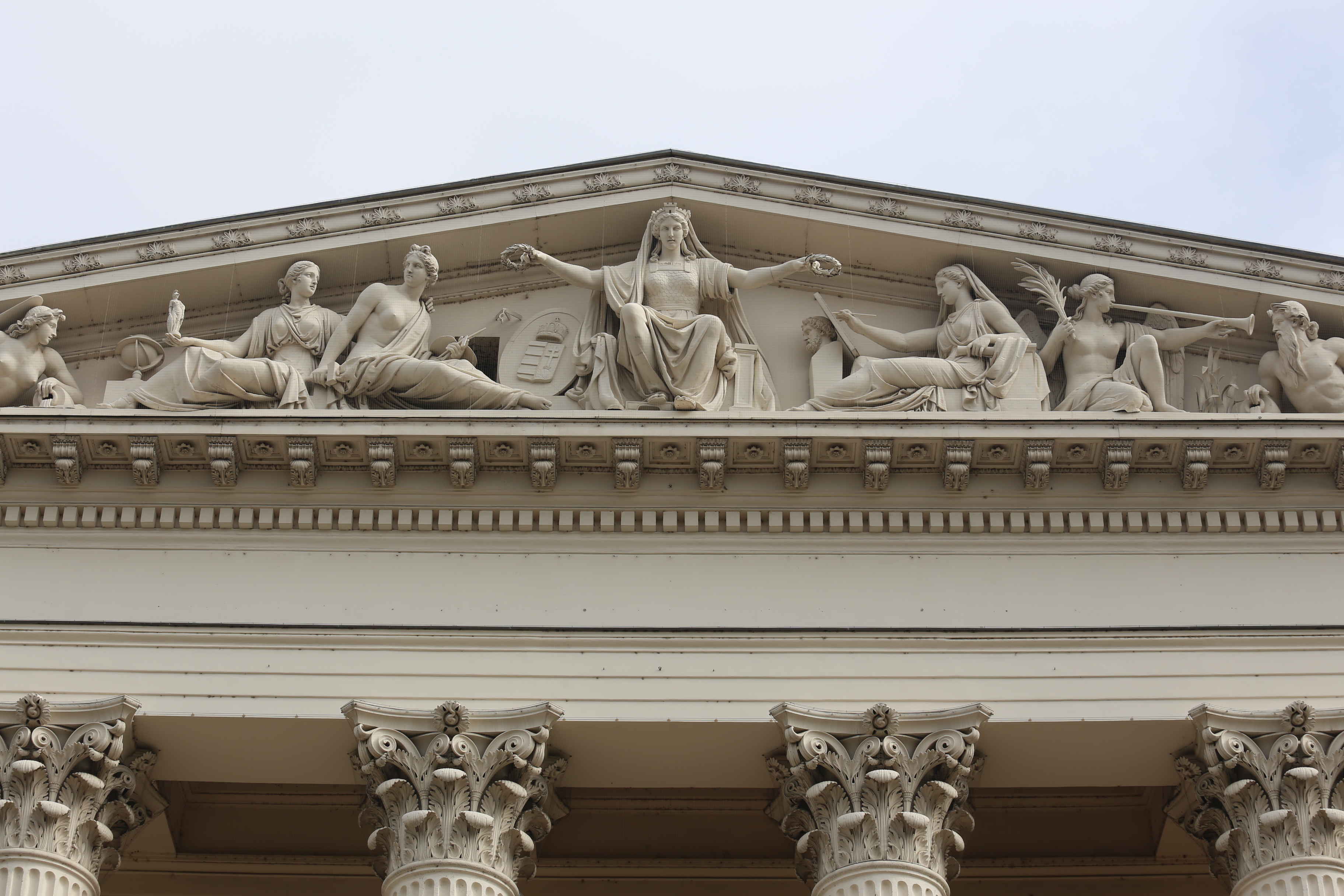 Magyar Nemzeti Múzeum This is a photo of a monument in Hungary. Identifier: 945